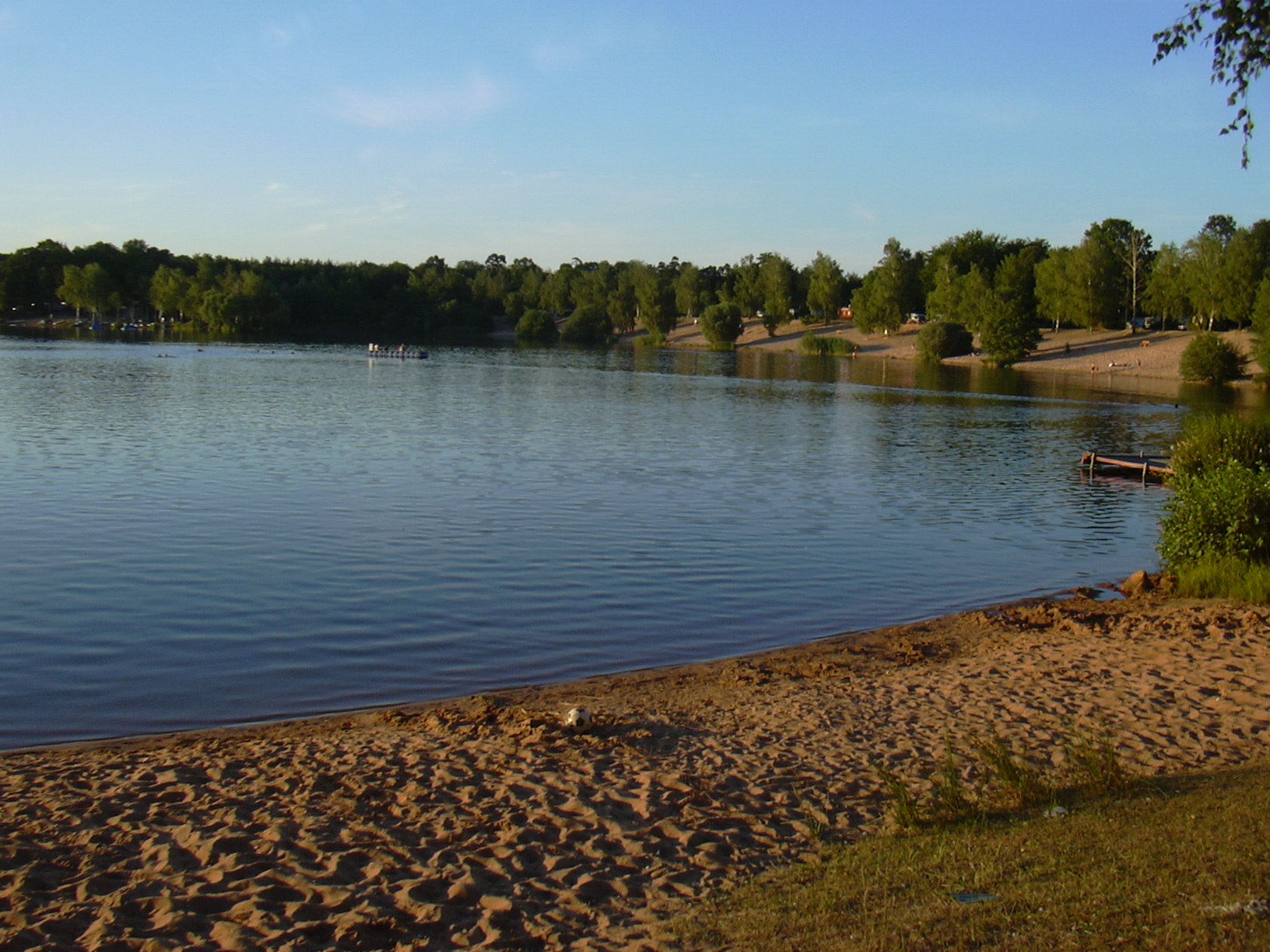 Sandy beach Kahler See (Freigericht-Ost), near Aschaffenburg, Bavaria/Germany